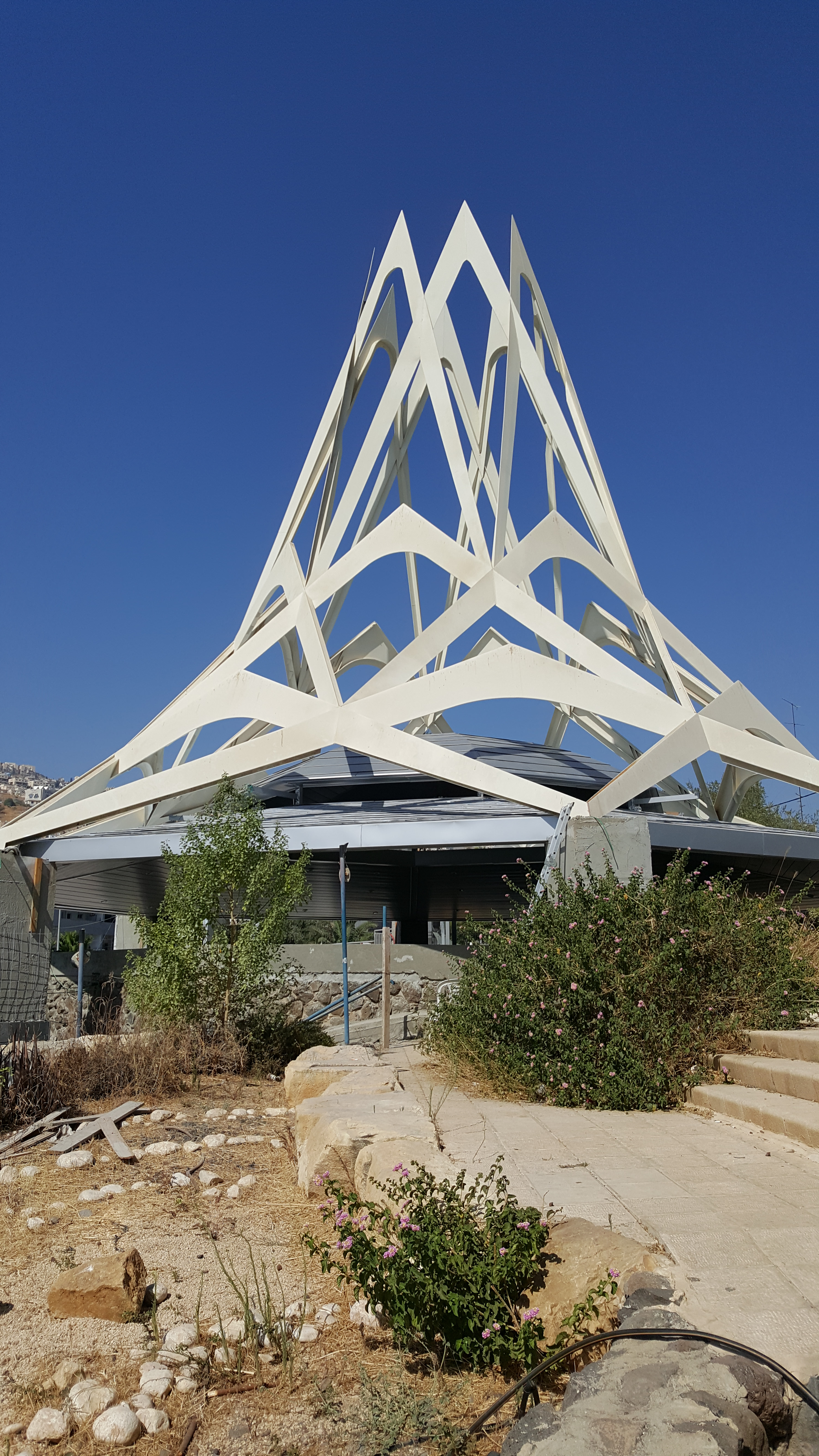 by ovedc - Elef Millim - Maimonides Heritage Center